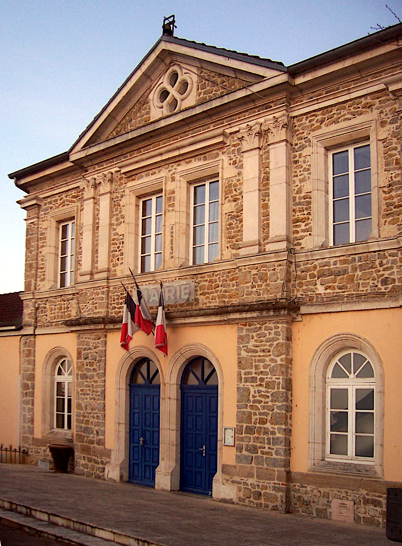 Mairie de Perreuil